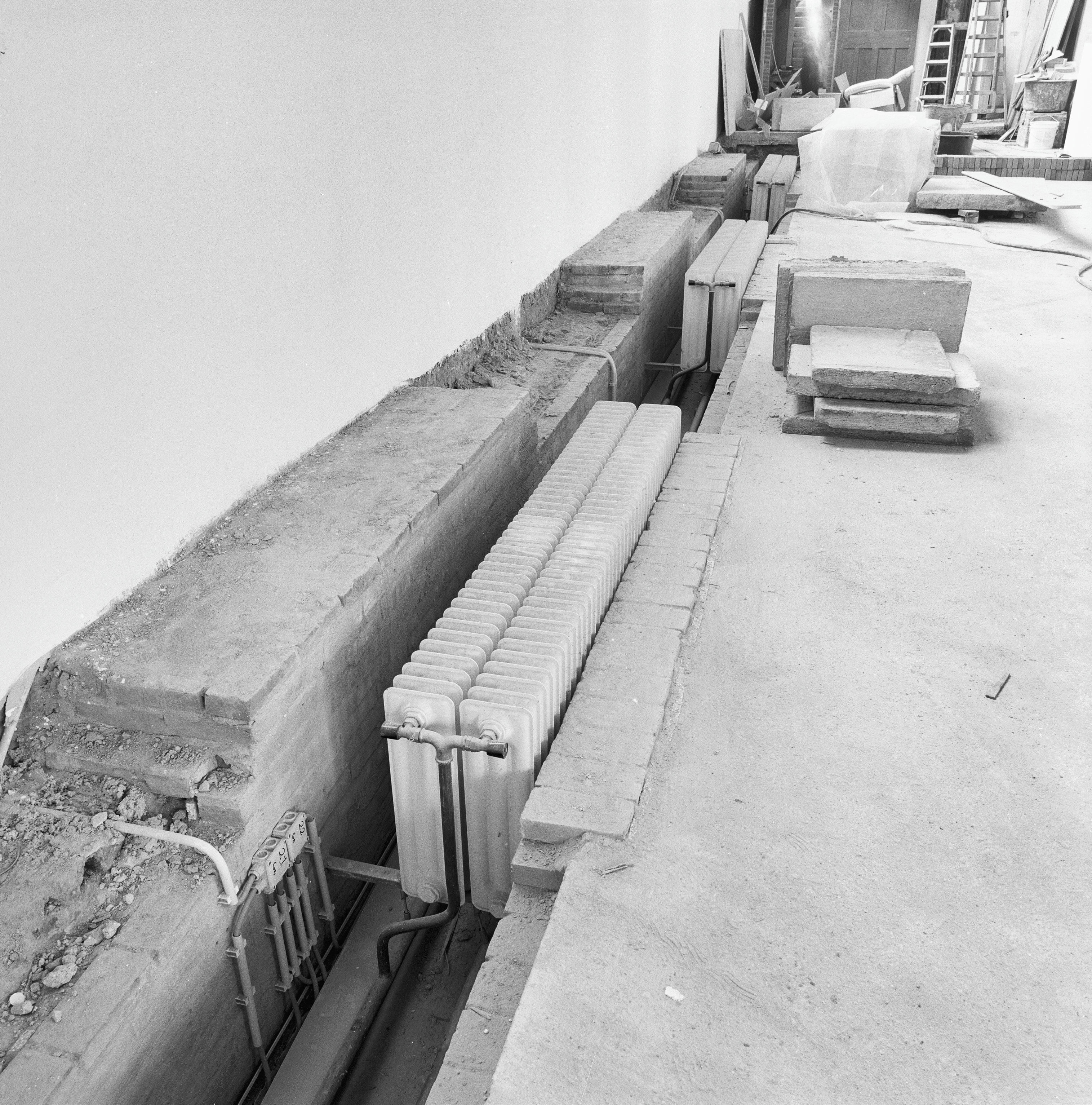 Nederlands Hervormde Kerk: interieur convector putten zuidbeuk gzien naar het westen.